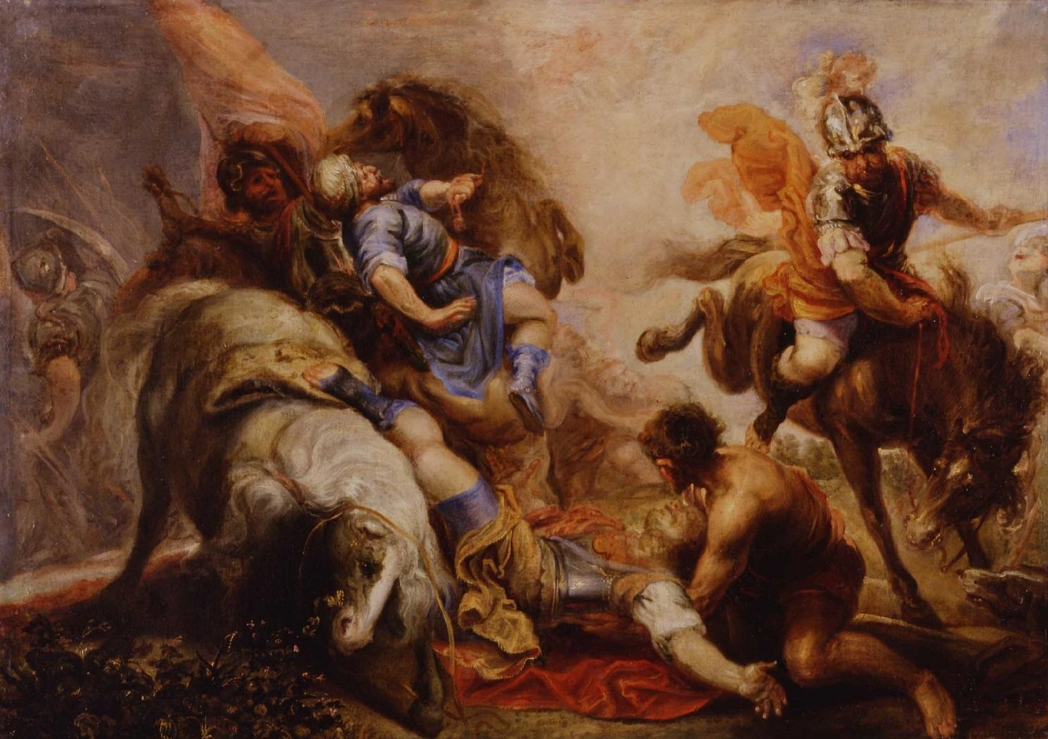 La obra representa el momento en que Pablo de Tarso se convirtió al cristianismo después de que Jesucristo se le apareciera cuando se dirigía hacia Damasco para perseguir a los cristianos.